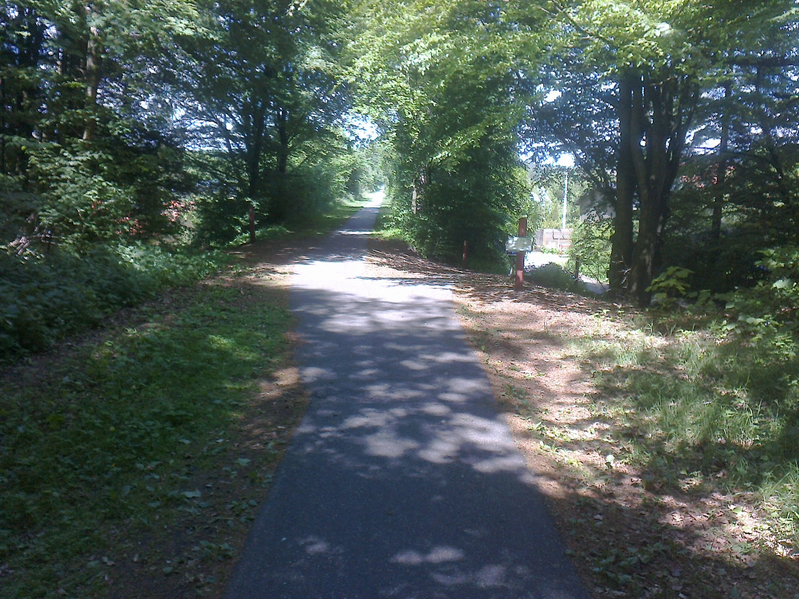 Bryrupbanestien kommer til Vesterled i udkanten af Silkeborg - her lå Ørnsø trinbræt